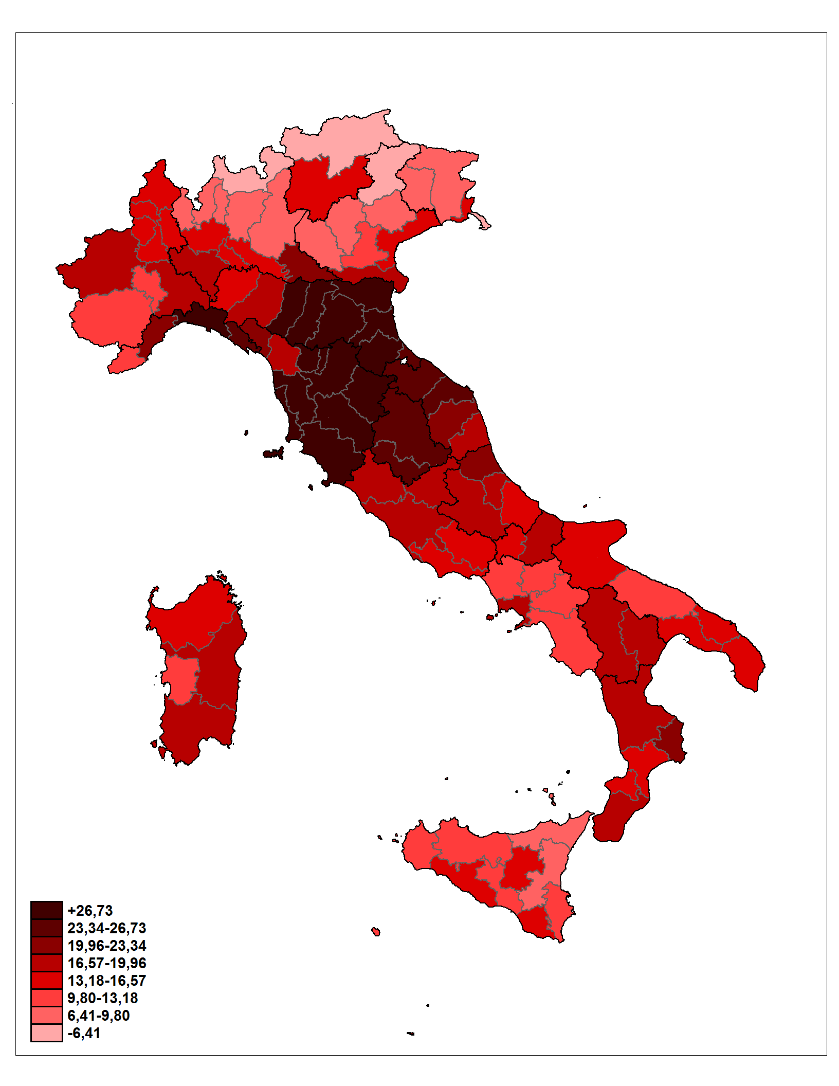 Distribuzione geografica del voto ai Democratici di Sinistra nelle elezioni politiche italiane del 2001.